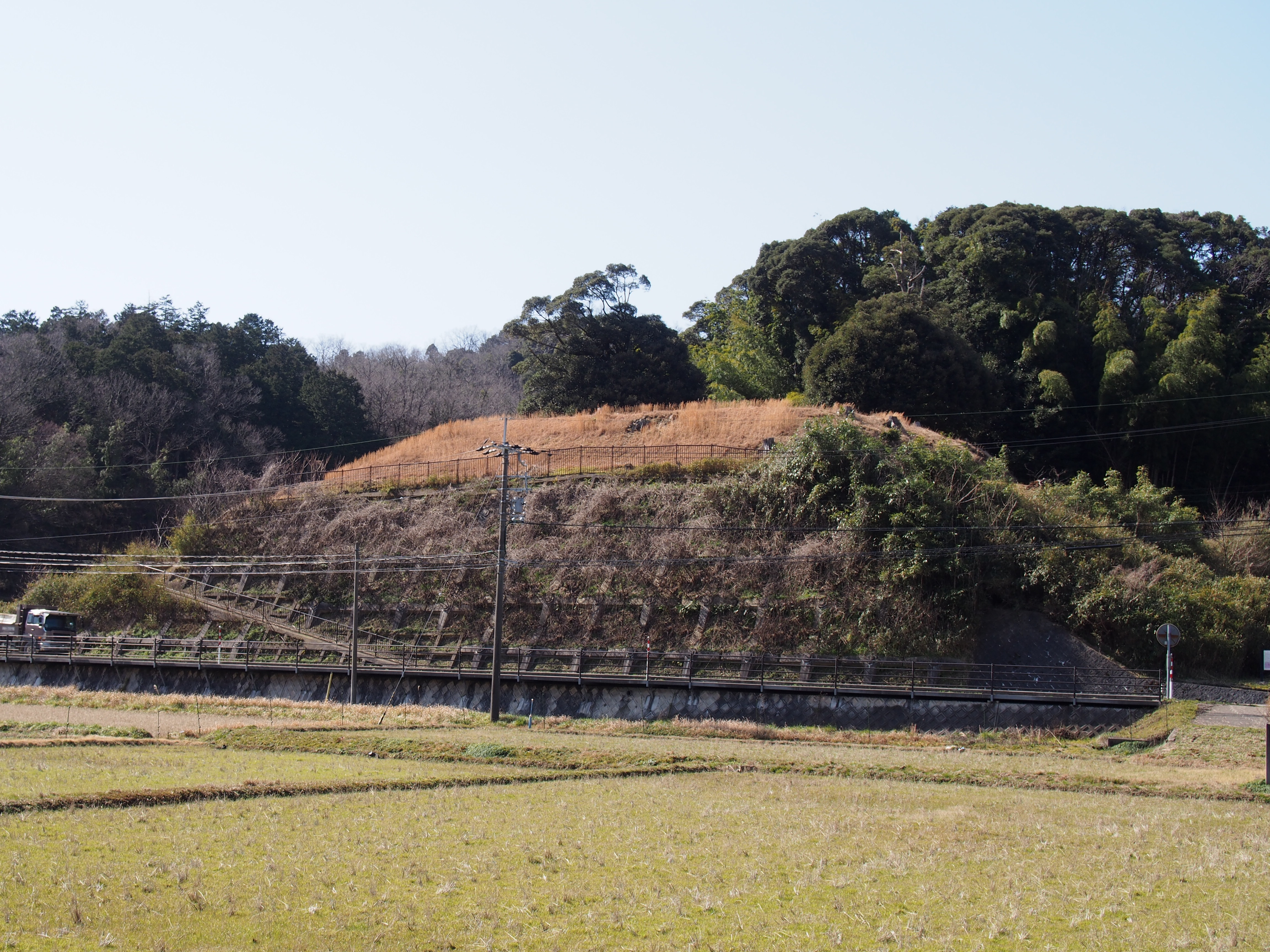 国指定史跡 赤坂今井墳墓（京都府京丹後市峰山町赤坂） 東側からの遠景、手前下が府道17号線